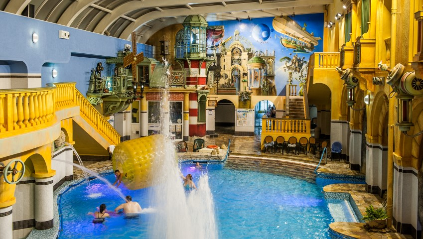 Aquapark po rekonstrukci